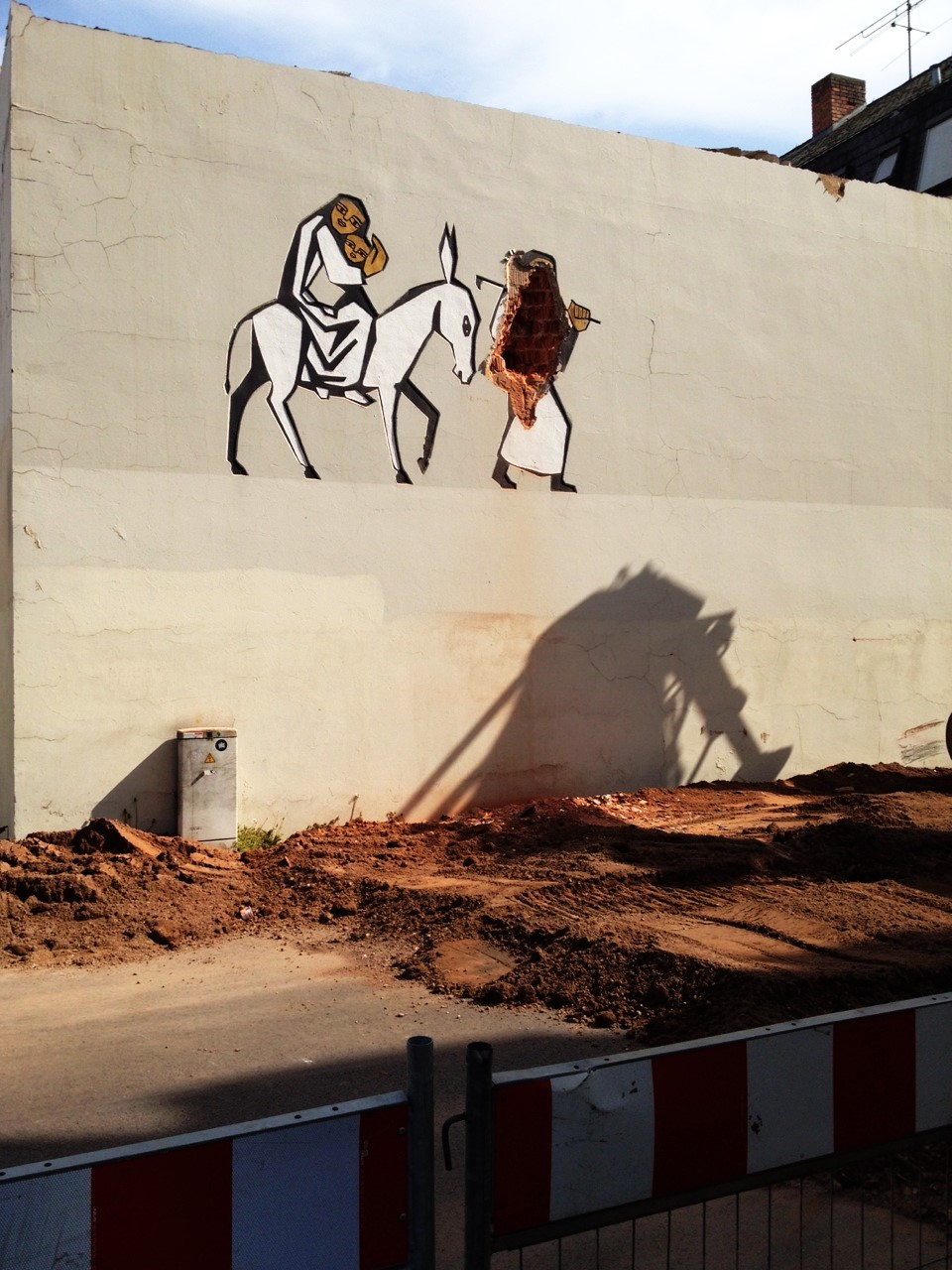 Victor Fontaine: Die Flucht nach Ägypten, Sgrafitto am Pfarrheim St. Ludwig, Zerstörung am 9. Mai 2016